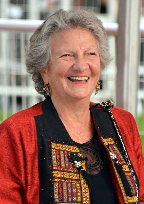 Marthe Villalonga au festival de Cannes